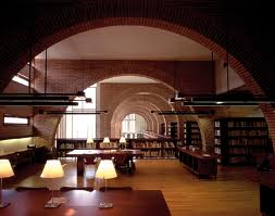 Le 1er étage : l'espace adulte.